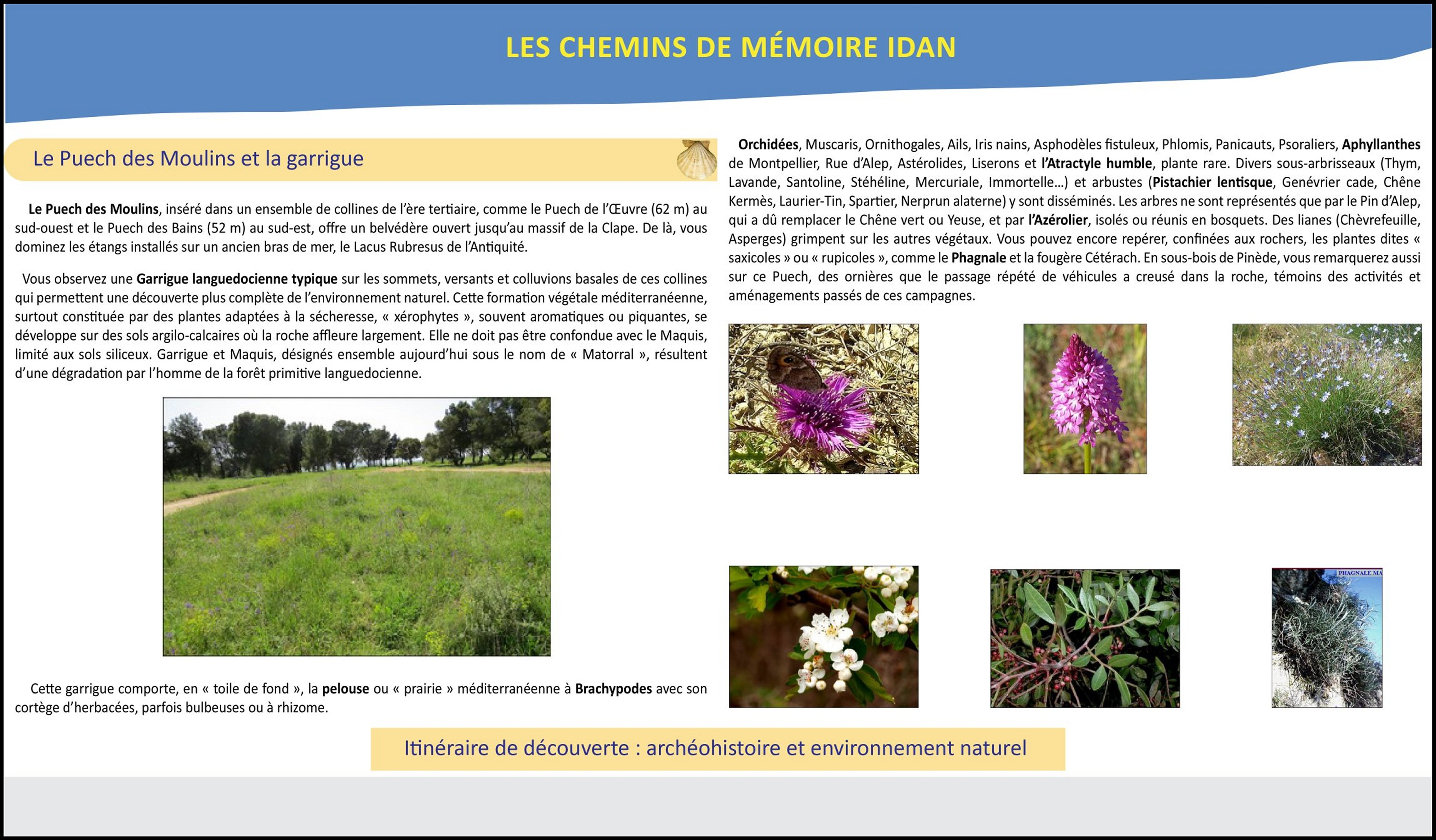 Puech des Moulins à Lespignan (Occitanie : Hérault) : maquette de panneau pour jalonner un chemin de mémoire IDAN.